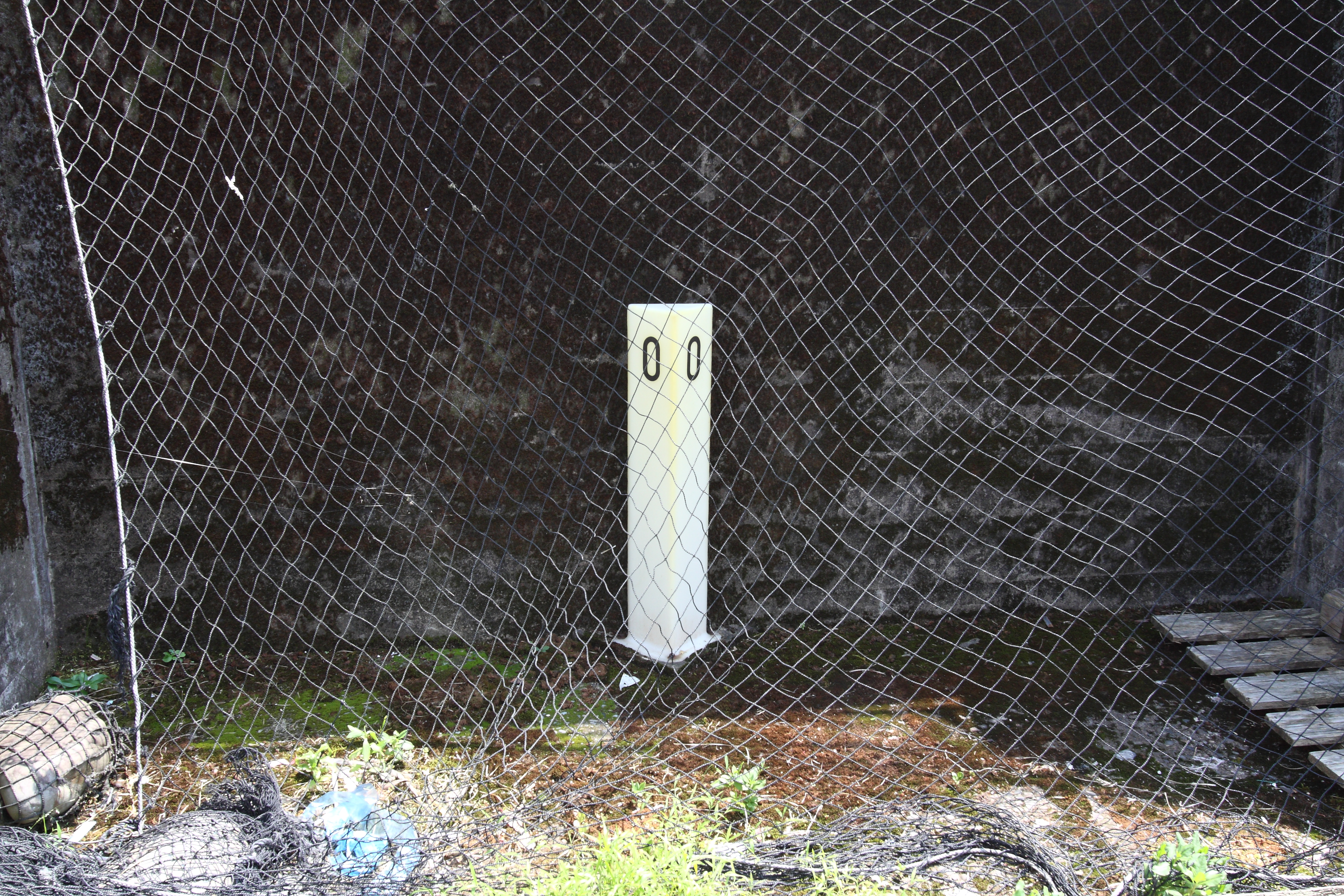 三重県道202号須賀利港相賀停車場線0キロポスト 三重県尾鷲市須賀利町